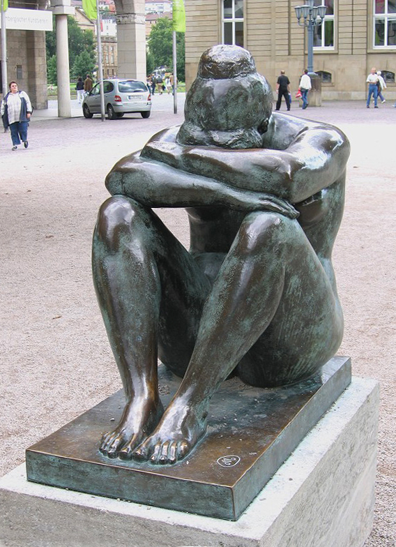 Aristide Maillol: la_nuit, 1902 Schlossplatz in Stuttgart (Öffentlicher Platz)